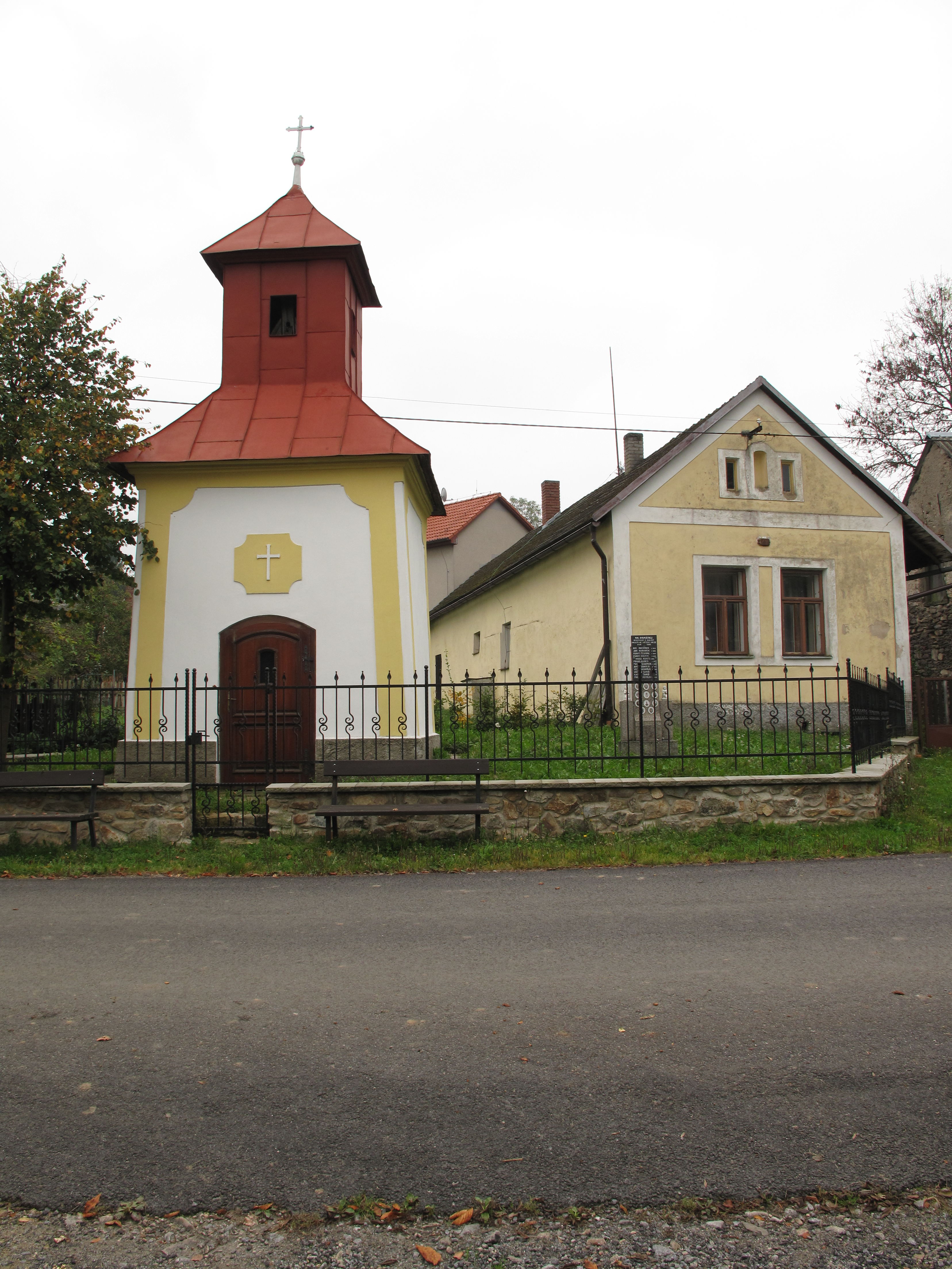 Kaplička v Kališti. Okres Benešov, Česká republika.